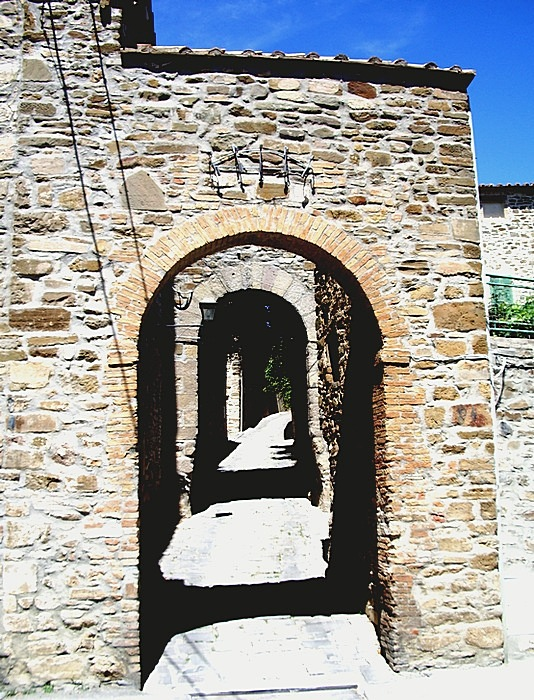 Porta e vicolo di Montenero d'Orcia (GR), Tuscany (Italy)